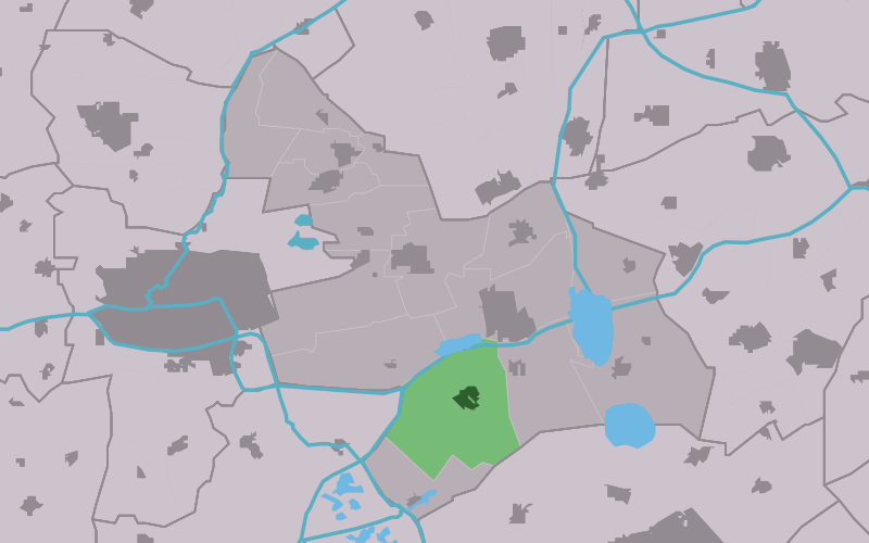 Kaartsje fan himrik fan Garyp